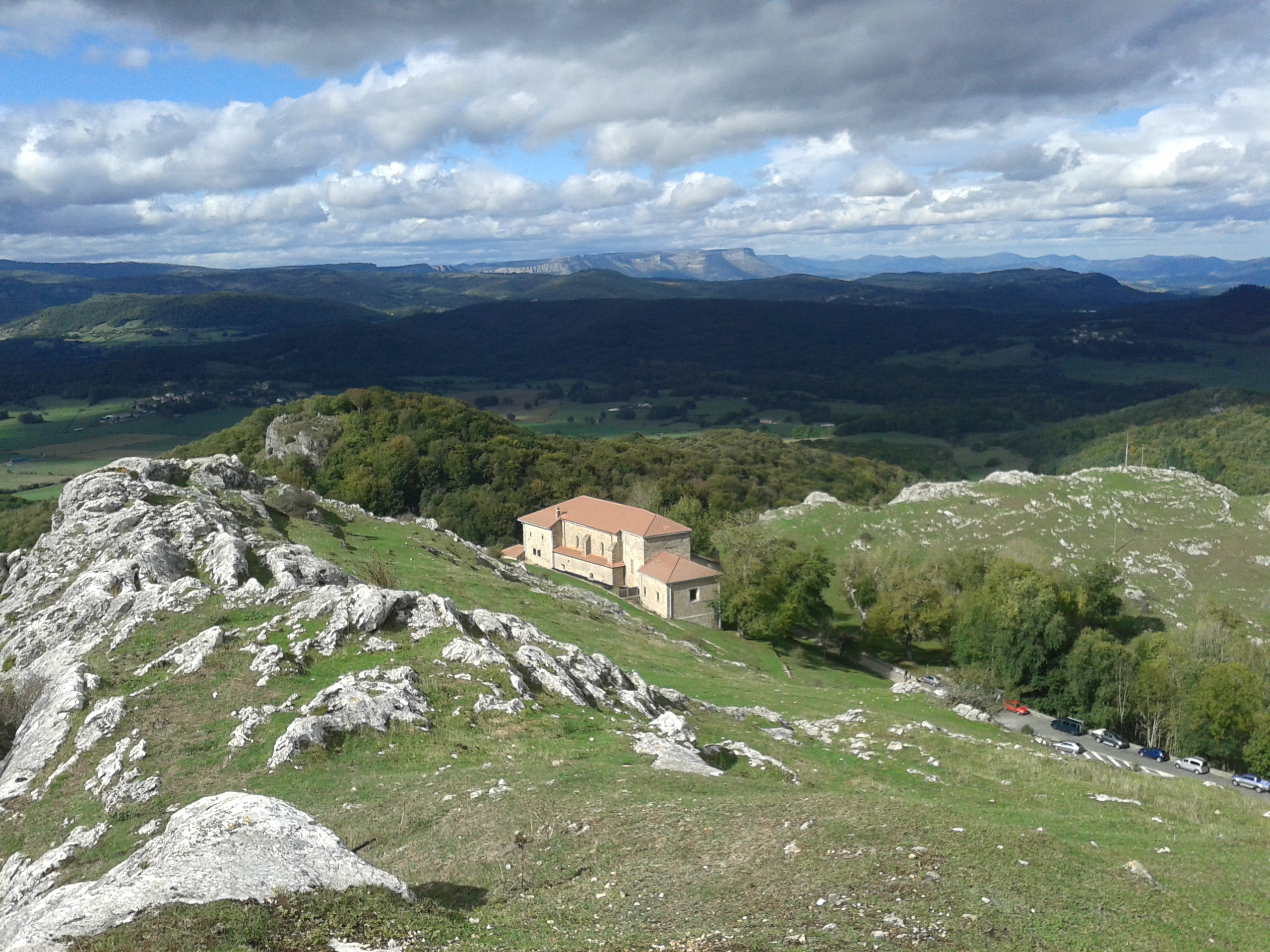 Zuiako Oro santutegia (2014-10-12)